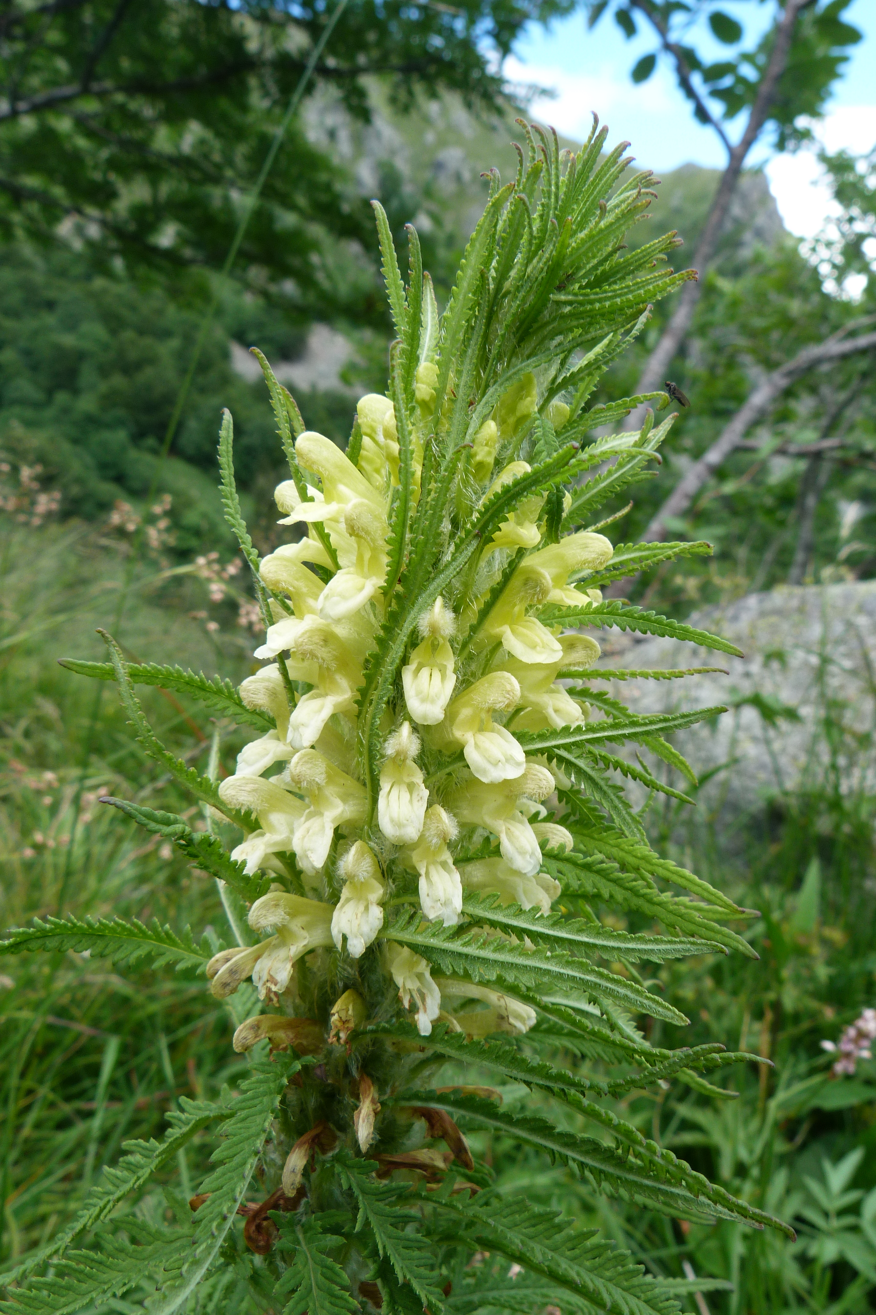 Pédiculaire feuillée (Pedicularis foliosa) dans le cirque du Wormspel, vers le Hohneck (massif des Vosges).